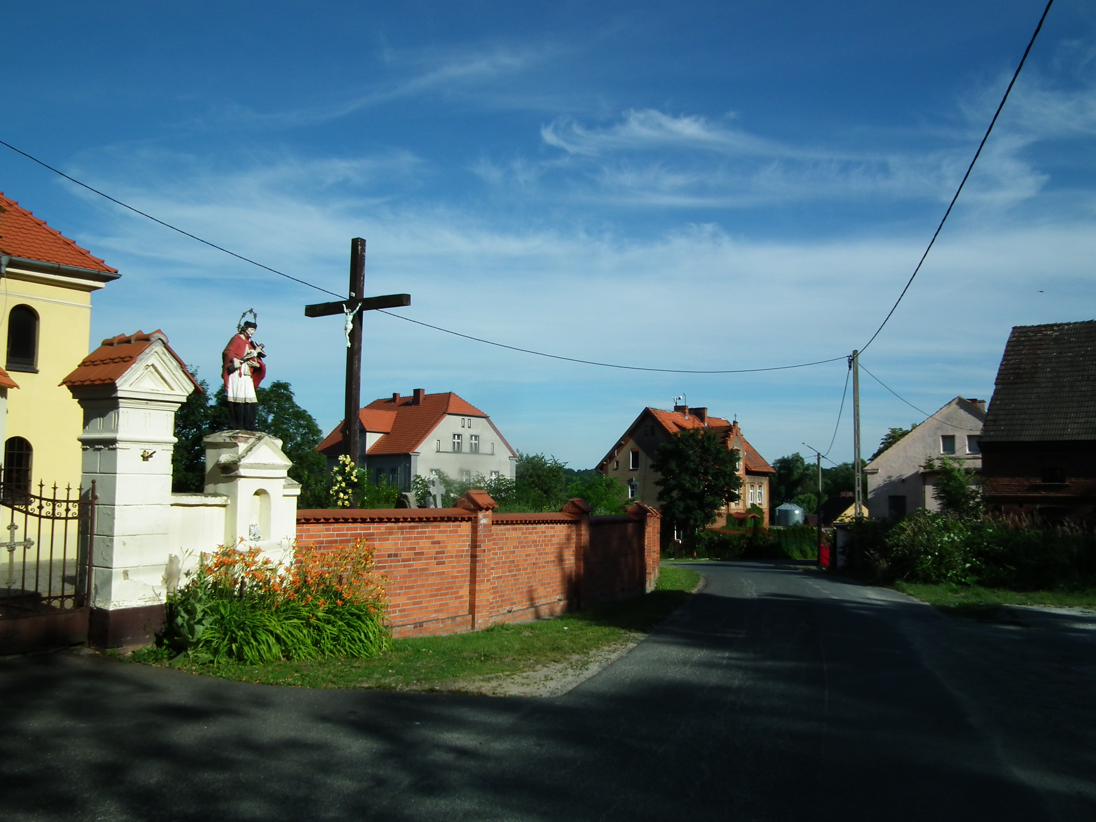 Fragment wsi Cerekwica koło Trzebnicy.